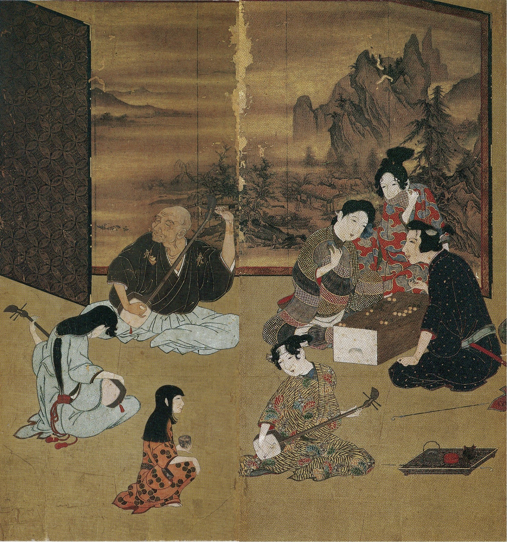 Hikone screen 1 and 2